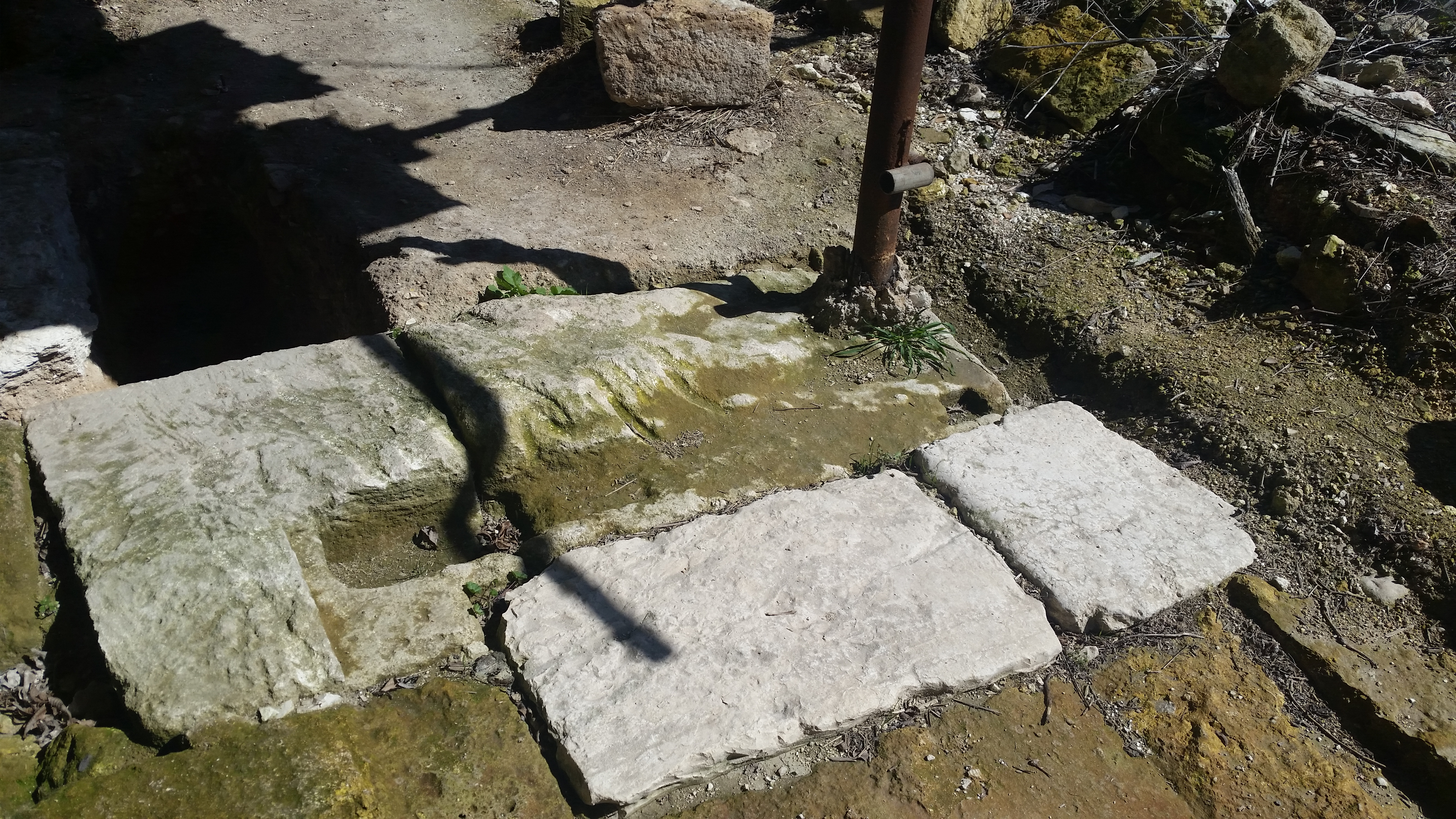 השער שנחשף באתר בית שערים בחצר הבית של טלי זייד